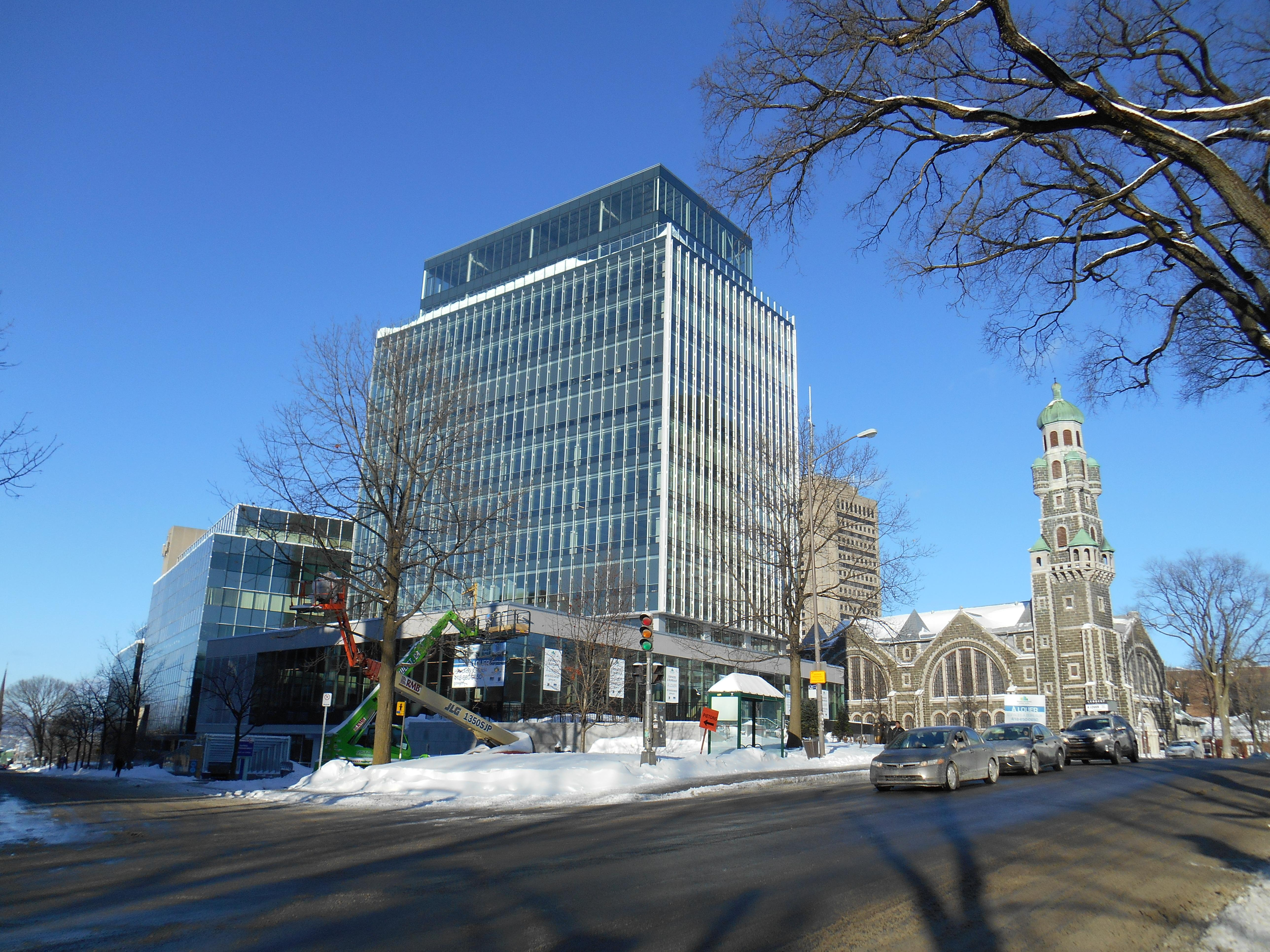 Édifice La Laurentienne, 500, Grande Allée Est, Québec